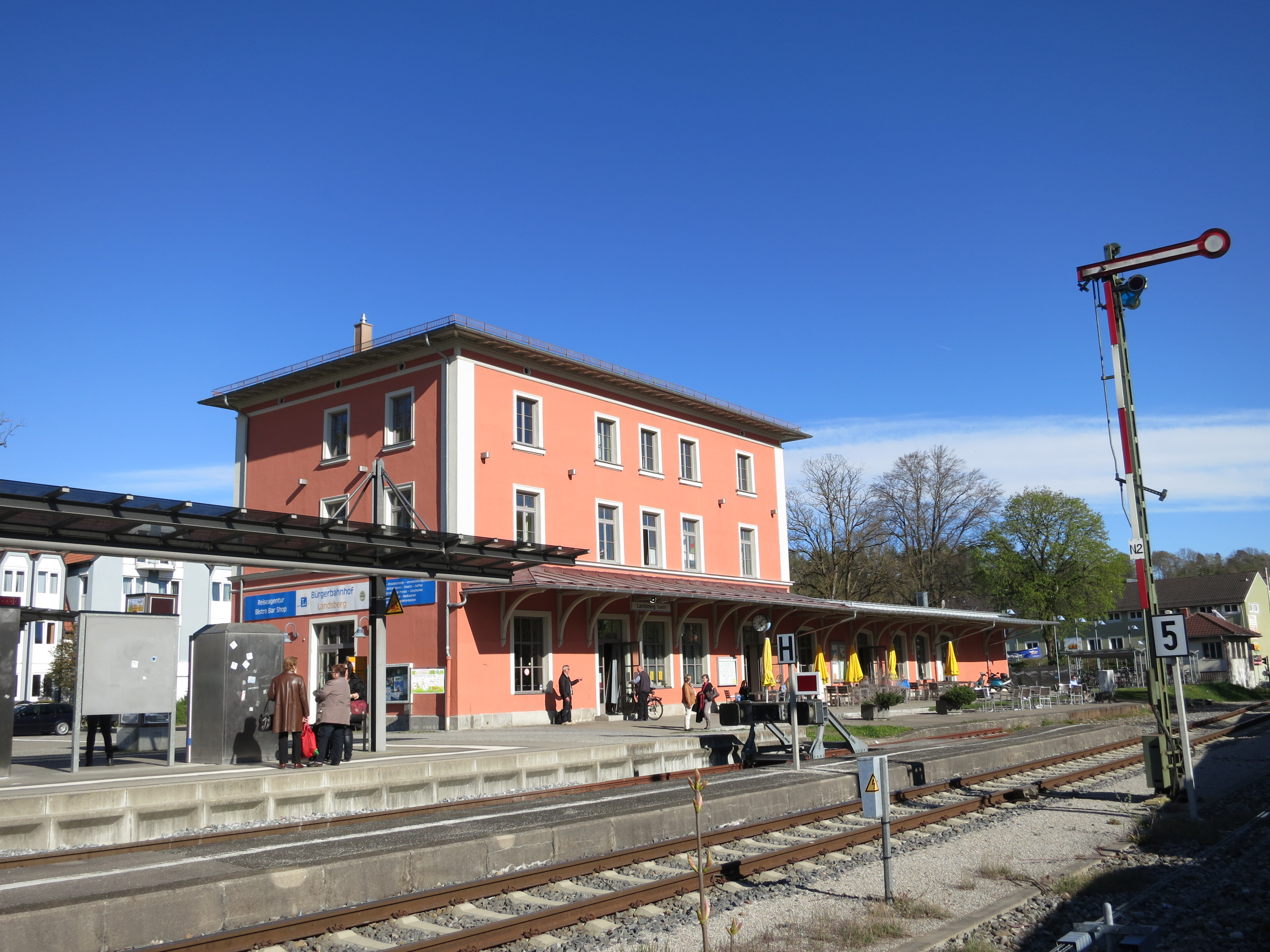 Empfangsgebäude des Bahnhofs Landsberg (Lech) von der Gleisseite, rechts ein Formsignal